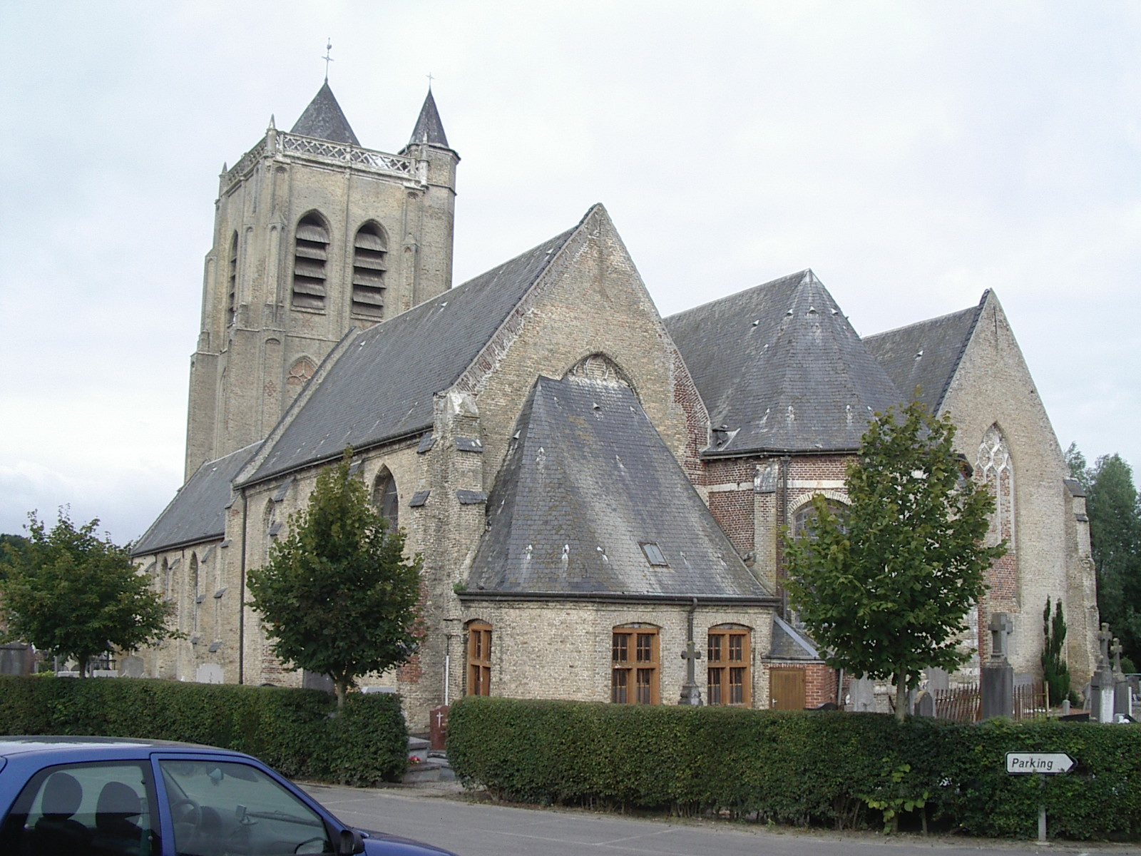 Eglise de Rubrouck (France, Nord)